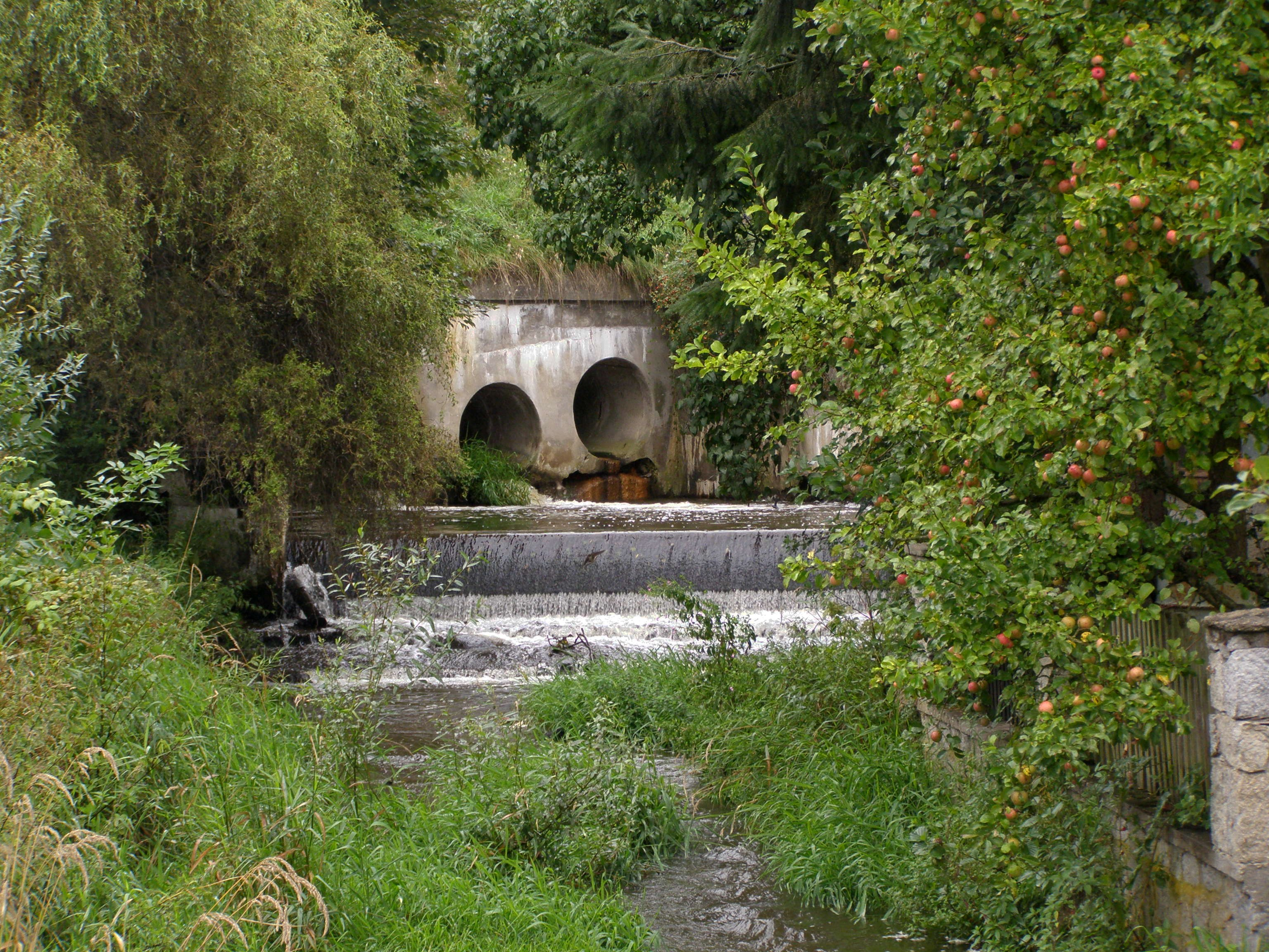 Bolíkovský potok, protékající vesnicí Markvarec